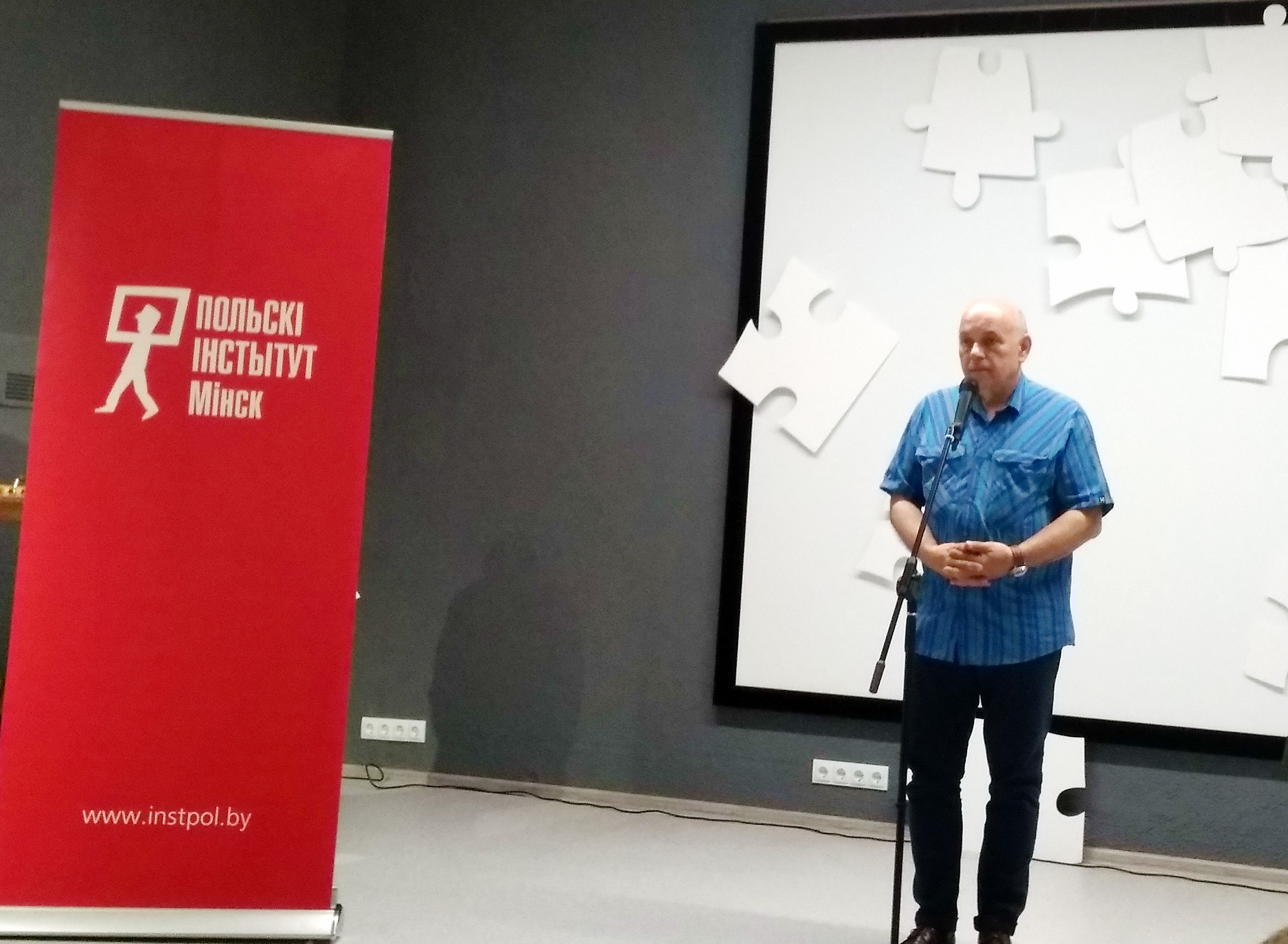 Cezary Karpiński. Dyrektor Instytutu Polskiego w Mińsku od 2018 r., Radca Minister Ambasady RP w RB